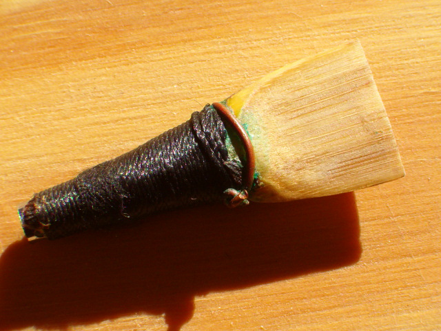 Palheta dupla para cantadeira de gaita transmontana. De minha autoria, para uso na Wikipédia desde que citada a fonte.